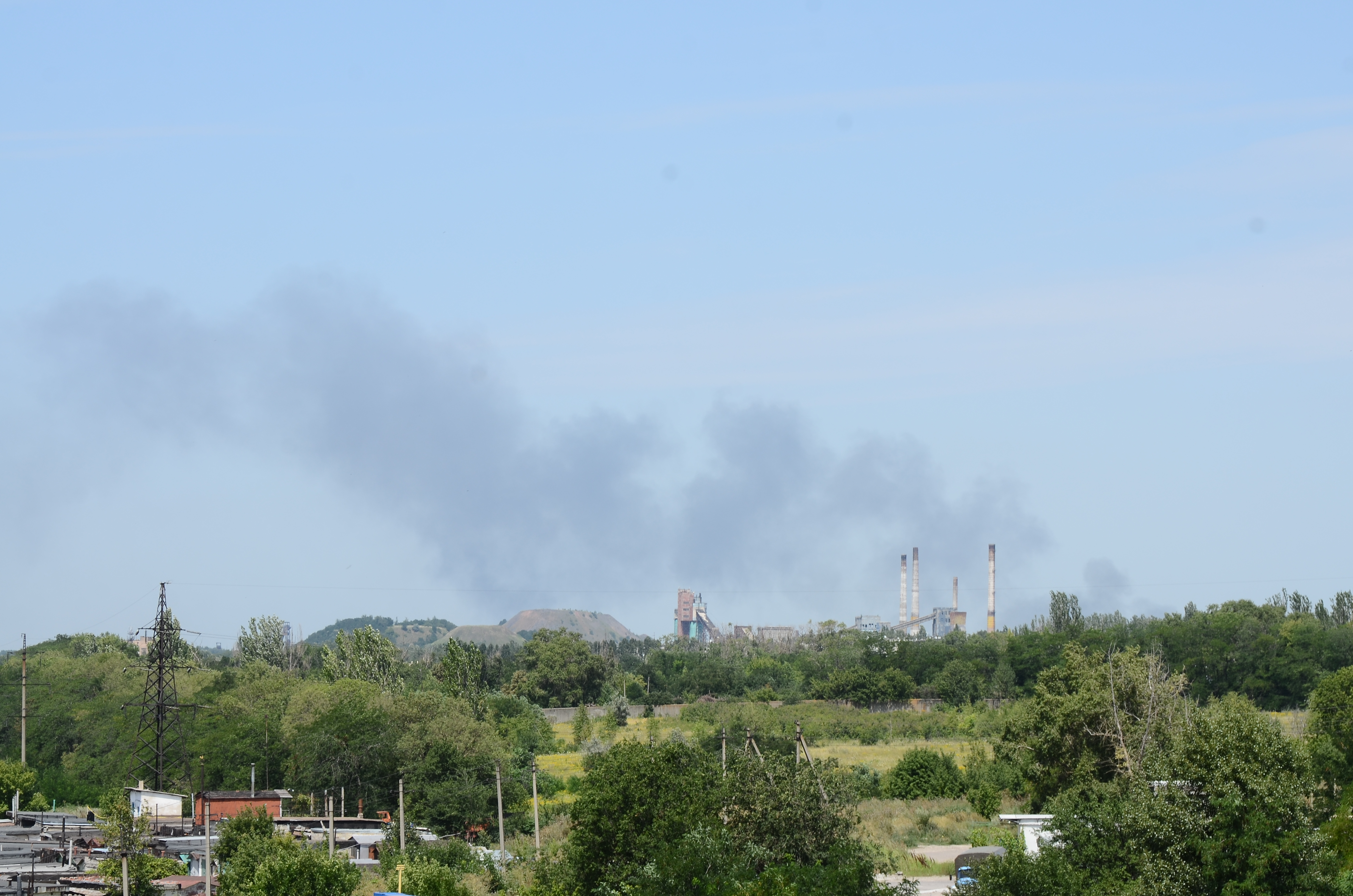 Донецк